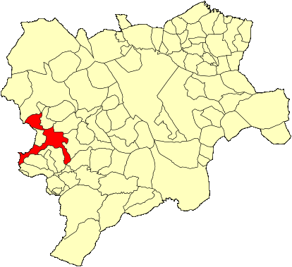 Mapa municipal de Albacete con el municipio de Alcaraz resaltado en rojo.